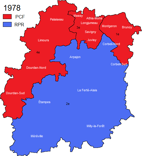 Carte électorale des circonscriptions de l'Essonne (91) en 1978.